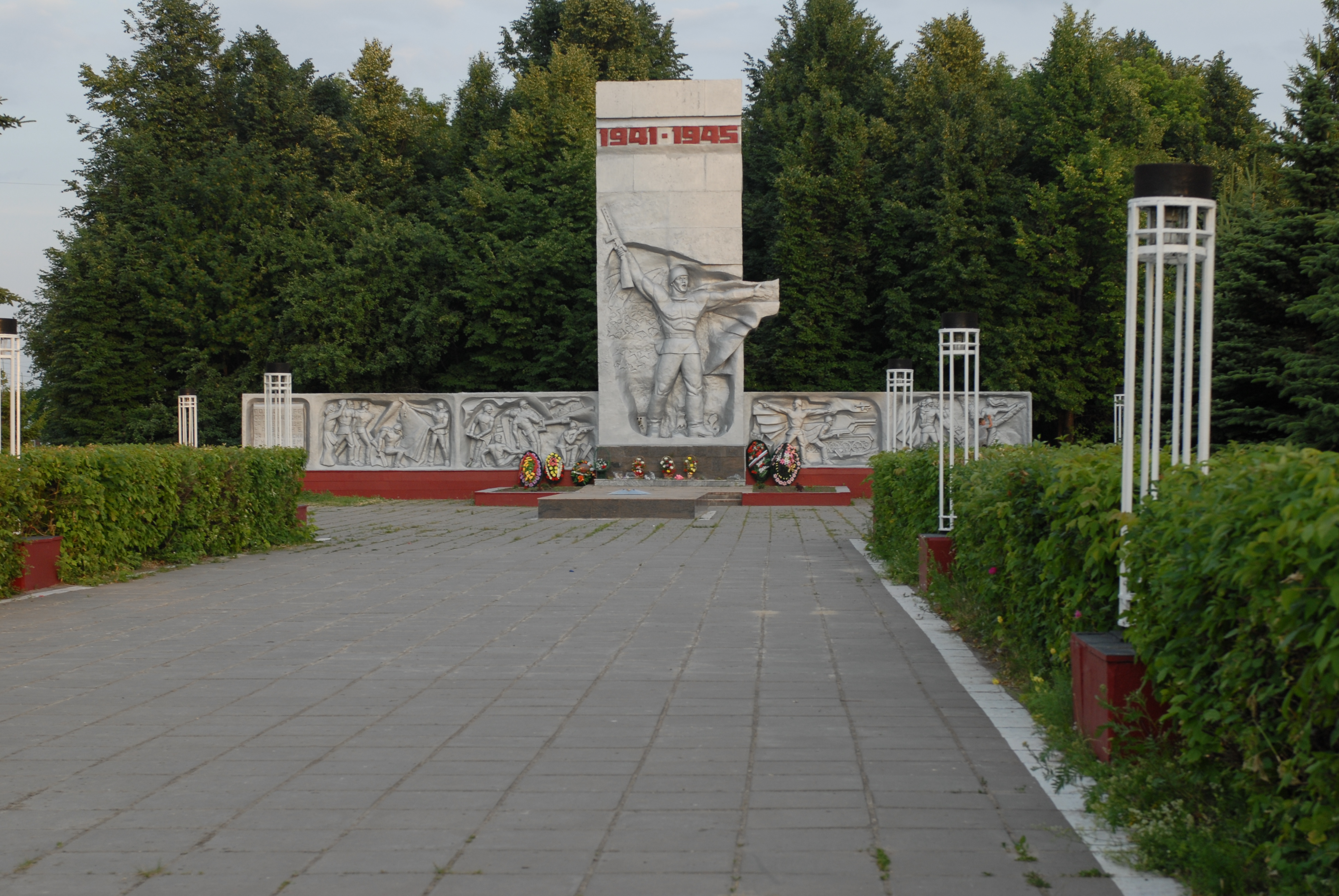 Монумент с вечным огнём в Канаше